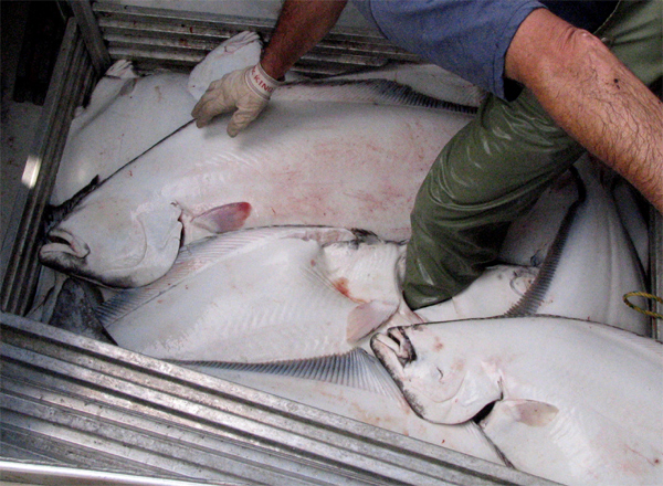 Flétans atlantiques entreposés dans un bateau de pêche